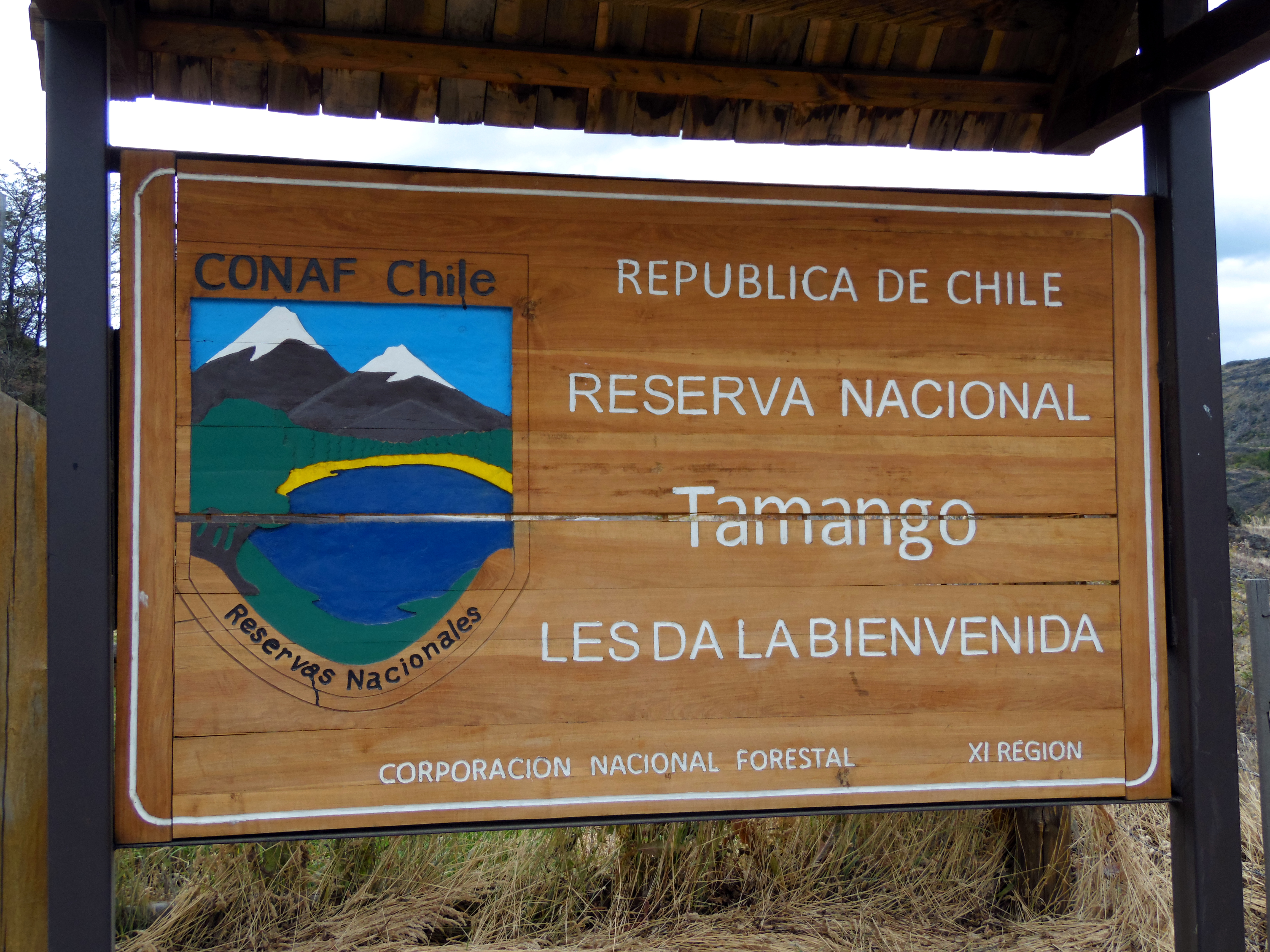 Reserva Nacional Lago Cochrane, Región de Aysén, Chile.